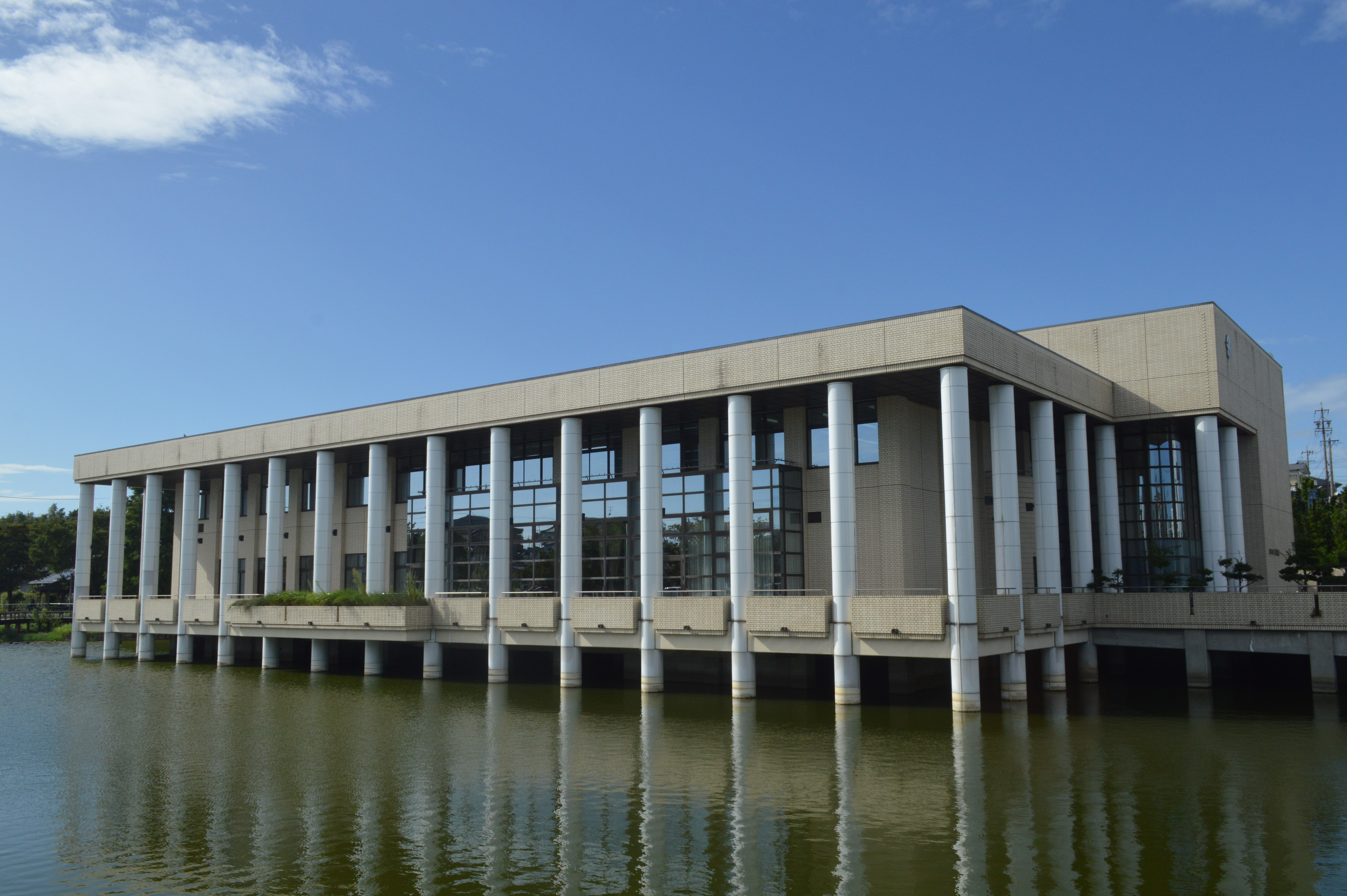 愛知県知多郡武豊町にある武豊町立図書館。